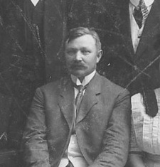 Frogner skole 3. realklasse og lærere 1911. Lektor Theodor Haagaas.